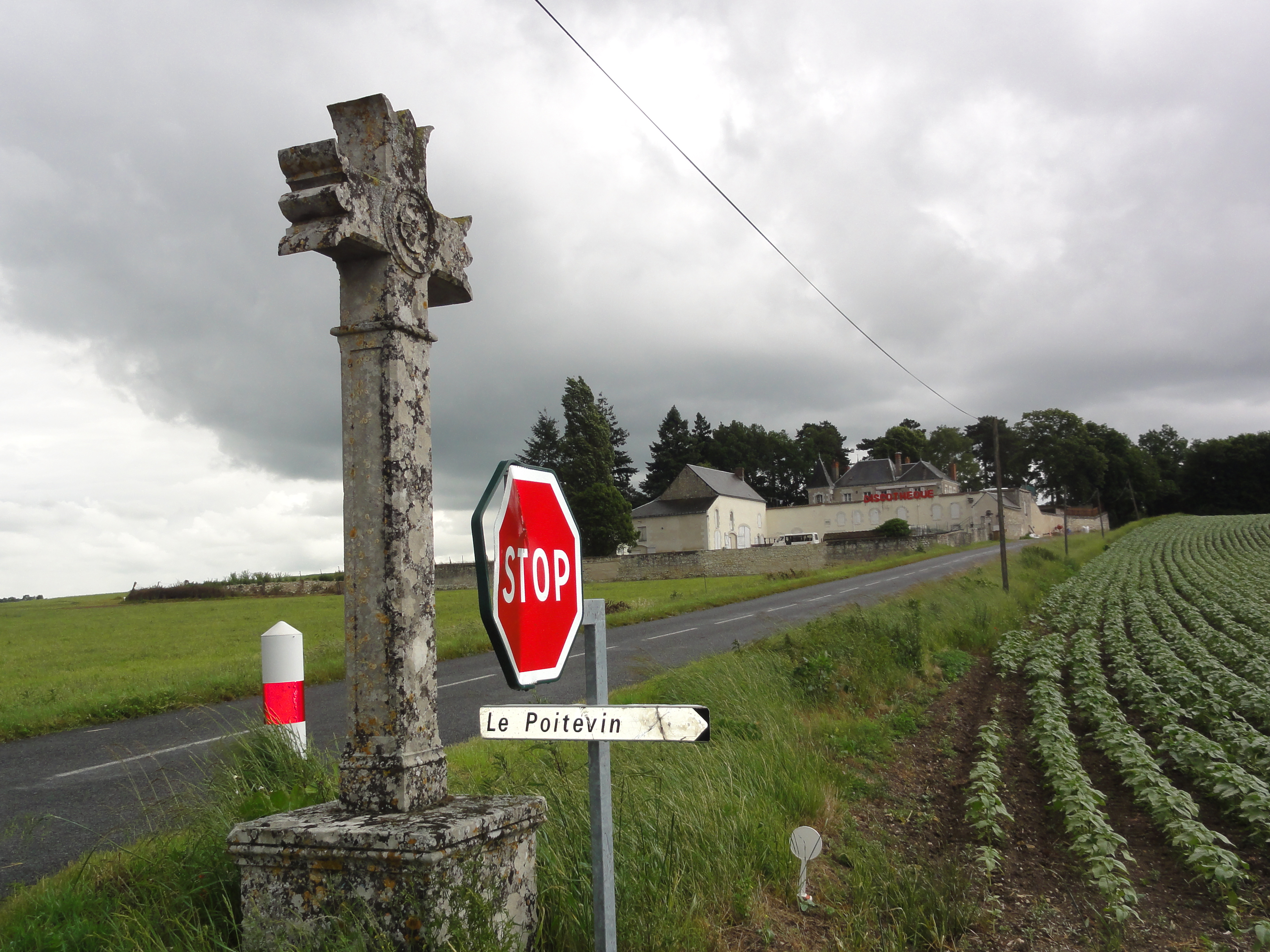 Draché (Indre-et-Loire) Croix de chemin 02